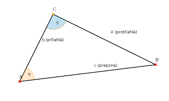 Pravouhlý trojuholník s pravým uhlom pri vrchole C. Priľahlá a protiľahlá odvesna sa vzťahujú k uhlu α